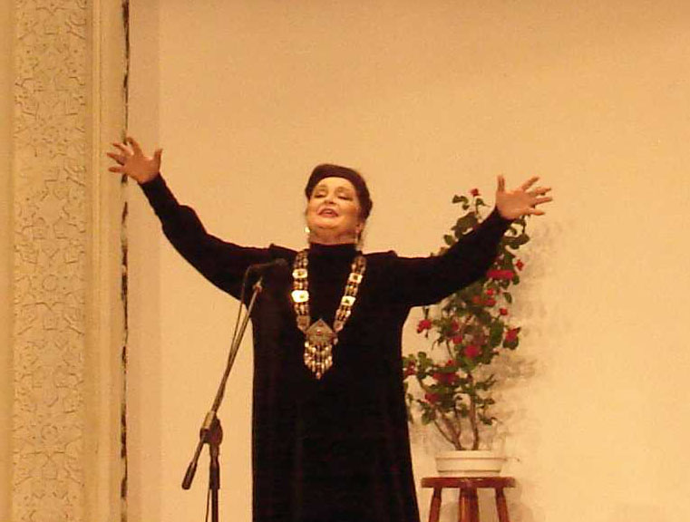 Недашковская Раиса Степановна